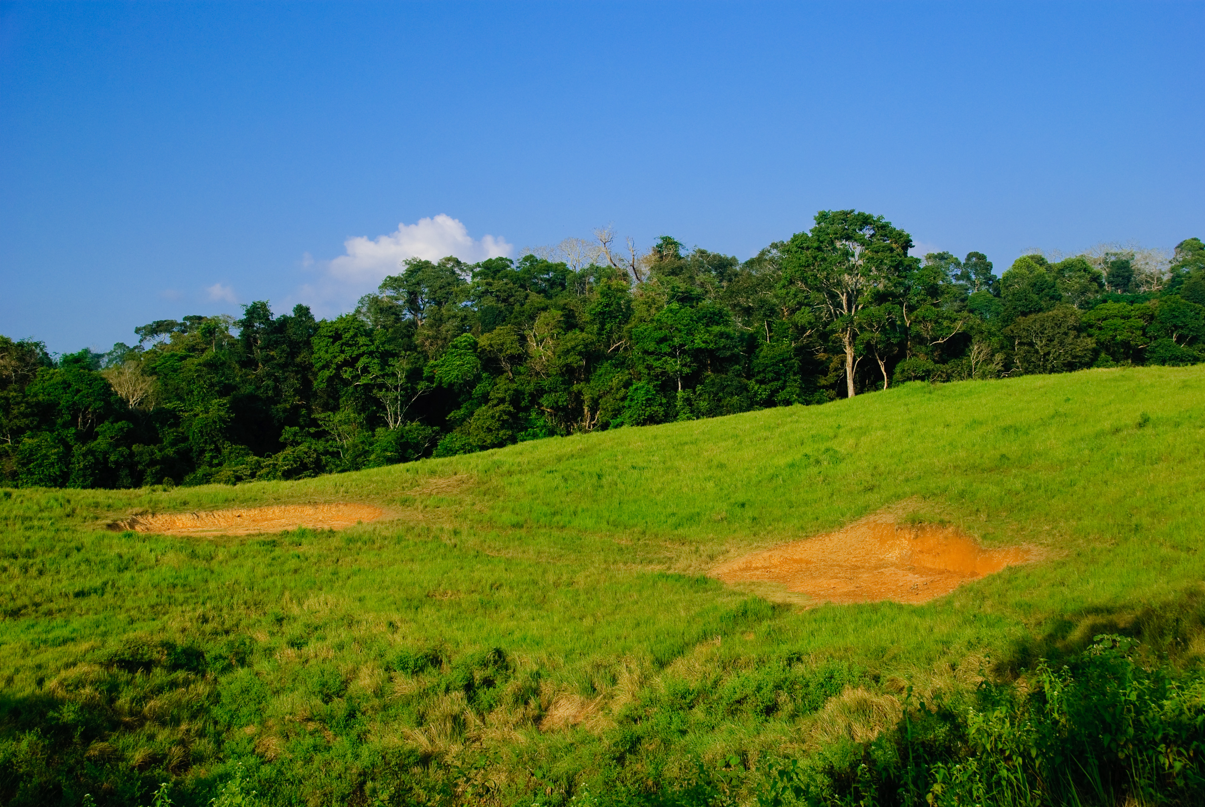 โป่งชมรมเพื่อน